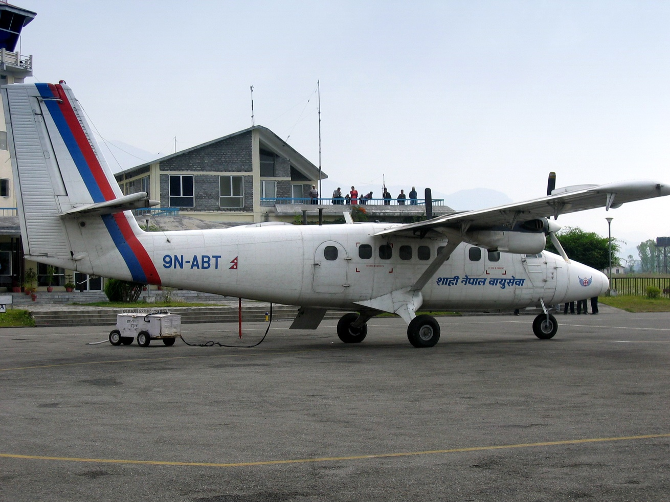 De Havilland Twin Otter 9N-ABT